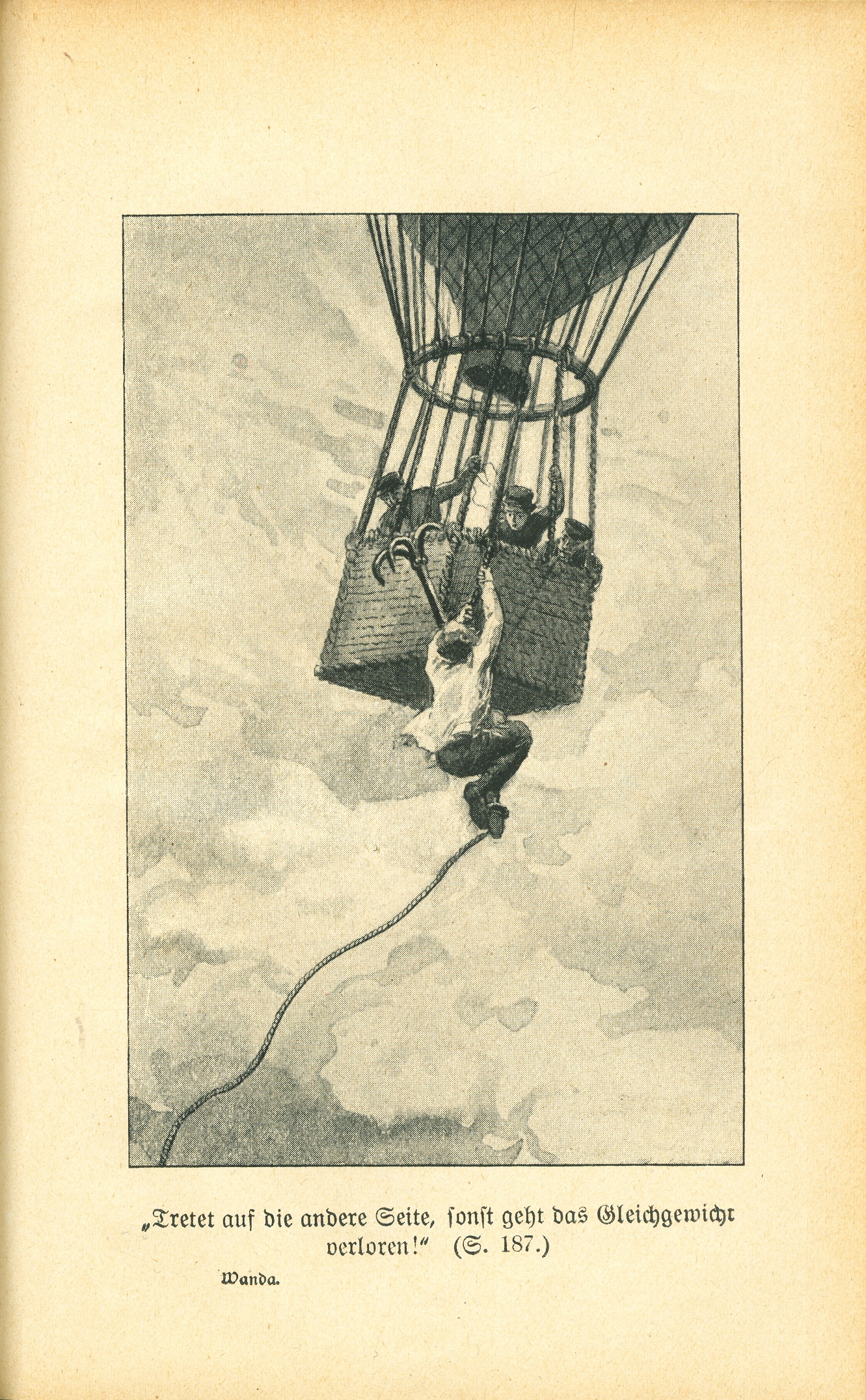 Wanda